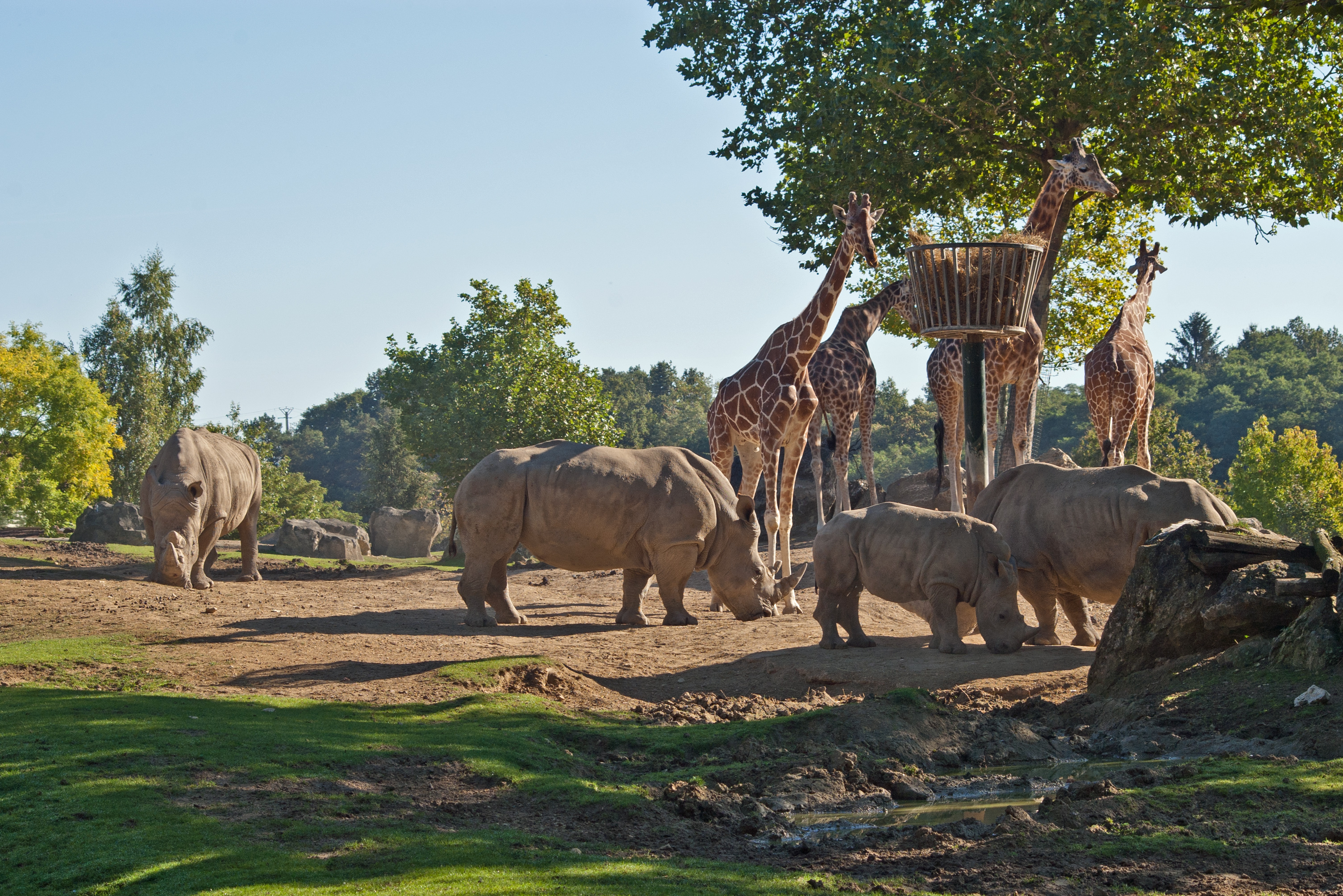 Le parc zoologique de Beauval est situé à Saint-Aignan-sur-Cher, dans le département de Loir-et-Cher, en France.Avec environs 5000 animaux et 400 espèces différentes, c'est le plus importants parcs zoologiques d'Europe.Le parc zoologique de Beauval fait partie du "Top 15" des parcs zoologiques mondiaux.The Beauval Zoo is located in Saint-Aignan-sur-Cher, in the department of Loir-et-Cher, France.With approximately 5,000 animals and 400 different species, it is the largest zoos in Europe.The Beauval Zoo is part of the "Top 15" zoos worldwid